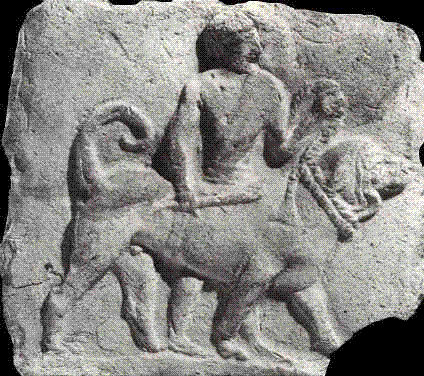 Mastino Napoletano rappresentato nel bassorilievo assiro del IX secolo a.C. Oggi il bassorilievo è conservato nel British Museum di Londra.